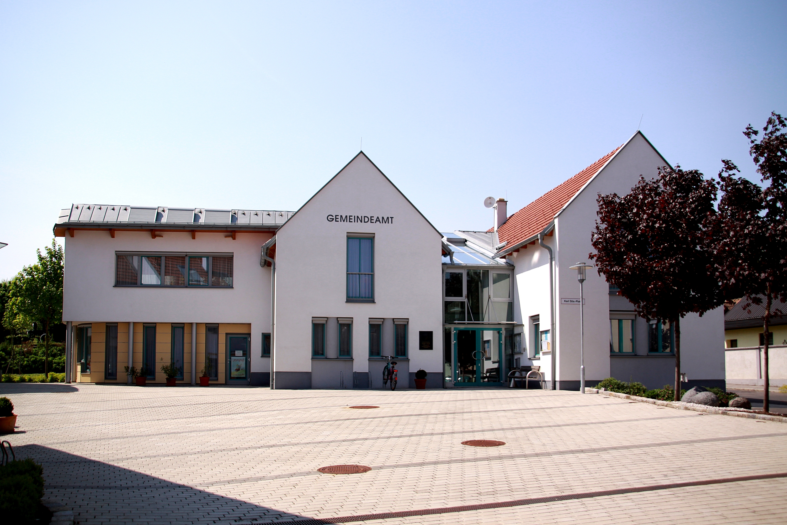 Rohrbach bei Mattersburg - Gemeindeamt